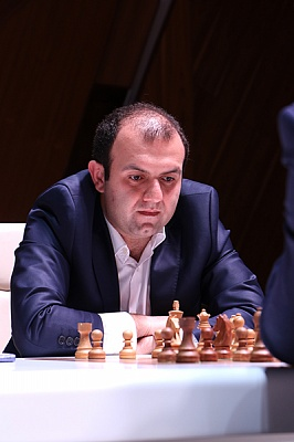 Рауф Мамедов, фото Этери Кублашвили с Мемориала Вугара Гашимов в Шамкире.